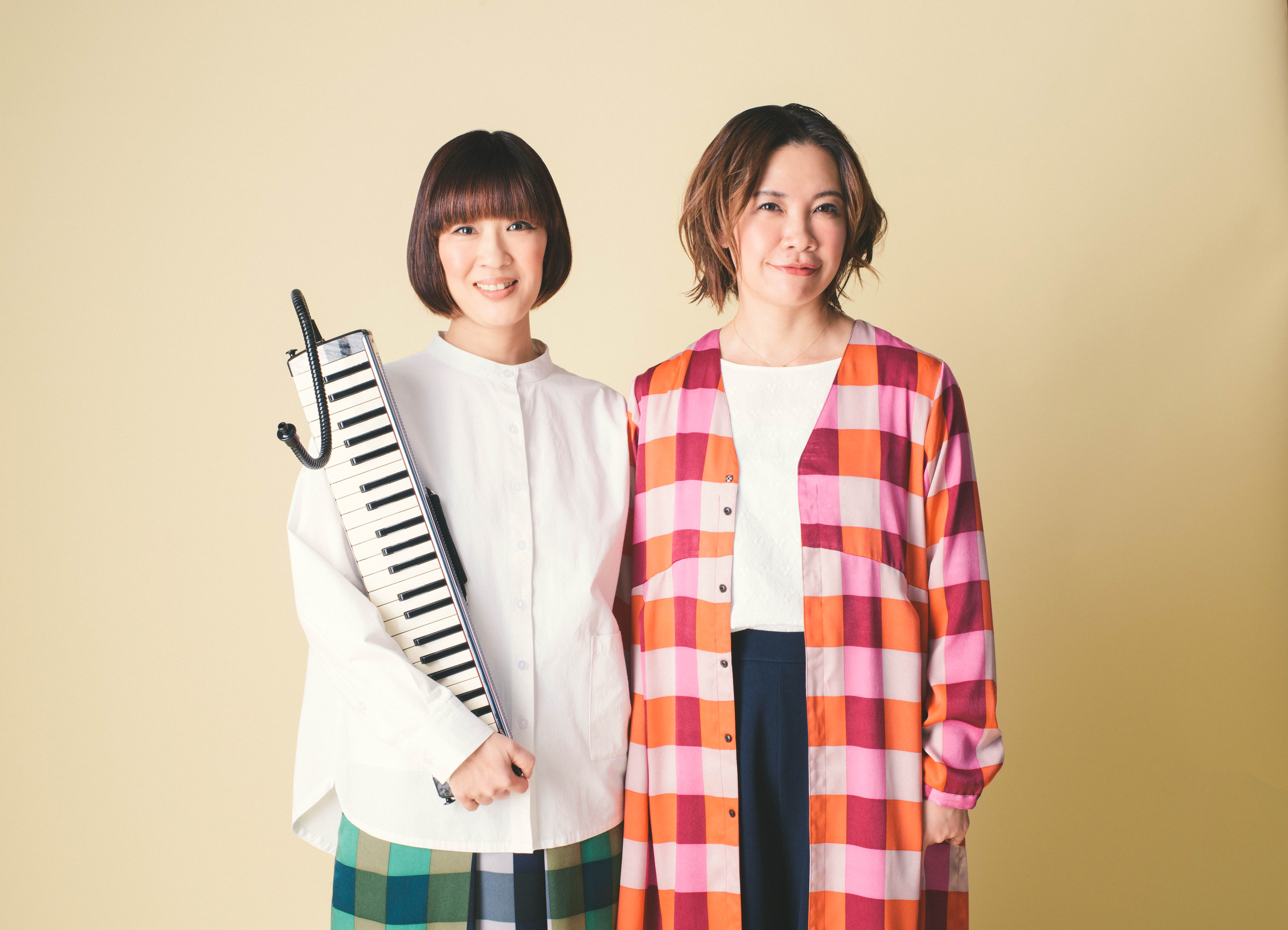 20周年